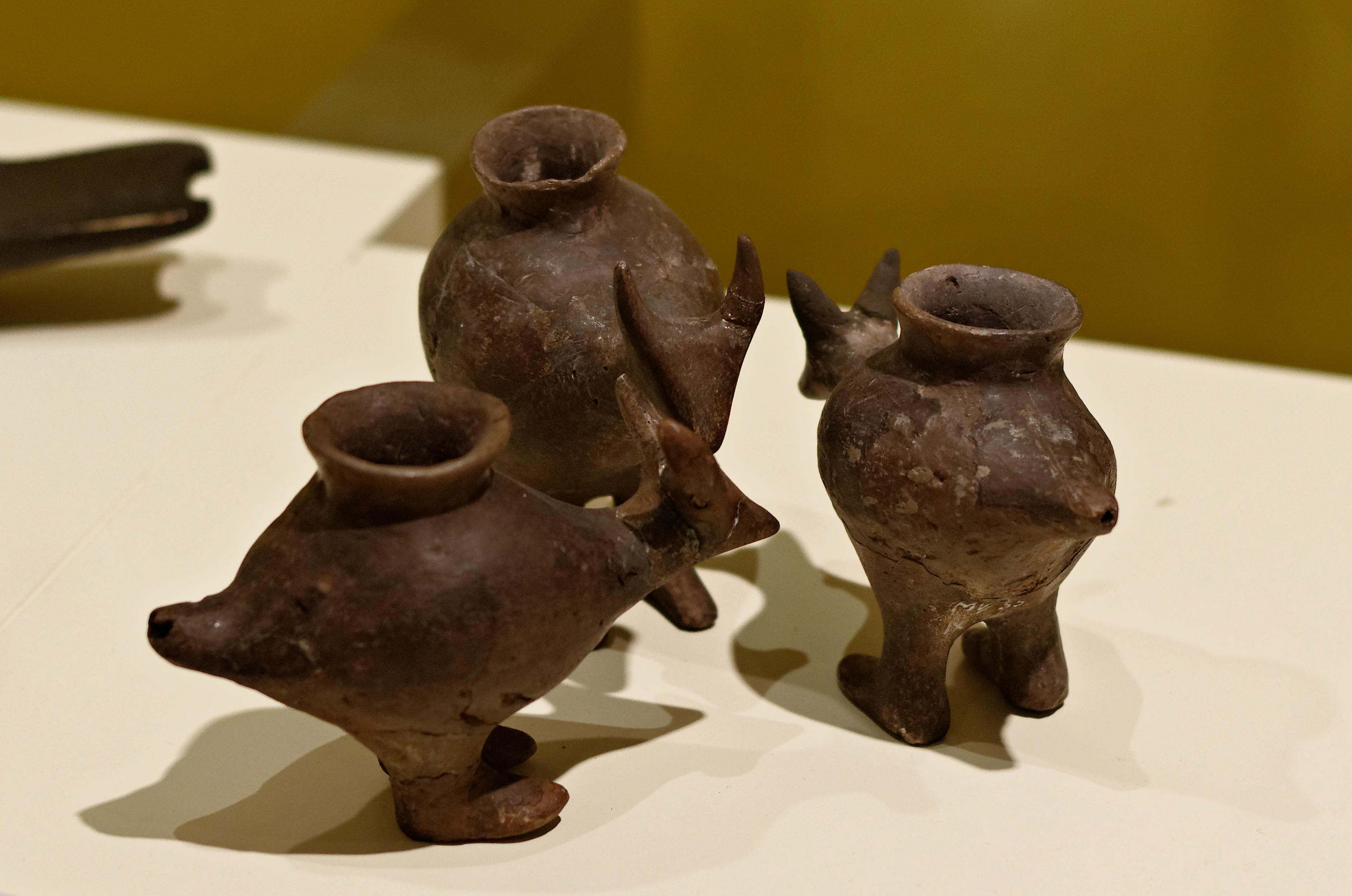 Objets en bronze datant de la civilisation des champs d'urnes (vers 1300 av JC). Exposés au Wien Museum Karlsplatz